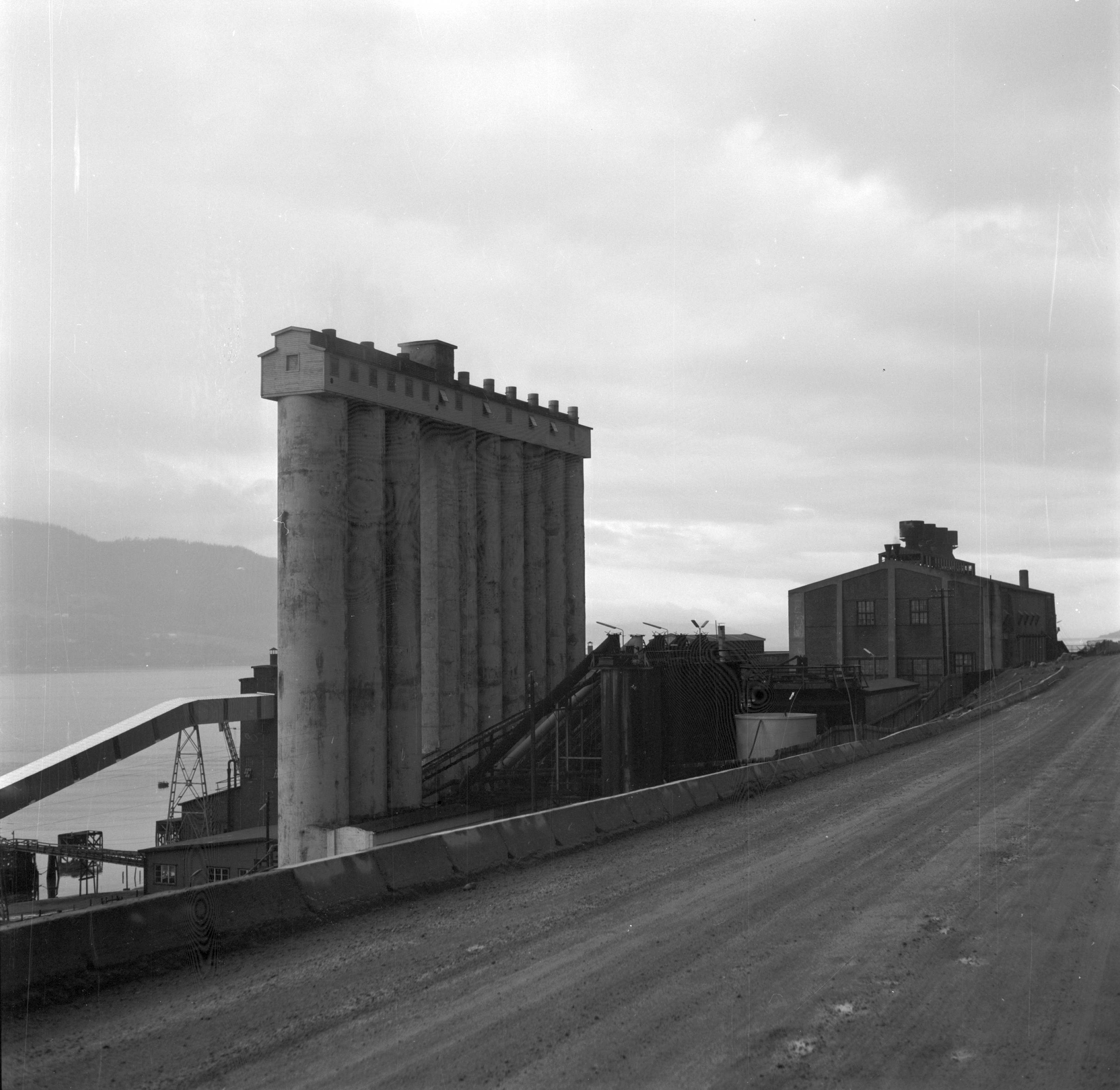 Smelteverket til Orkla Metall på Thamshavn i Orkdal.